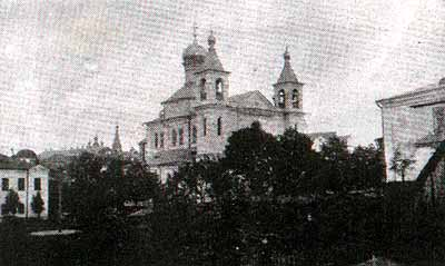 Свято-Петро-Павловская церковь (Екатерининская). Фото 1900г.